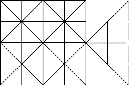 虎棋棋盤的一種